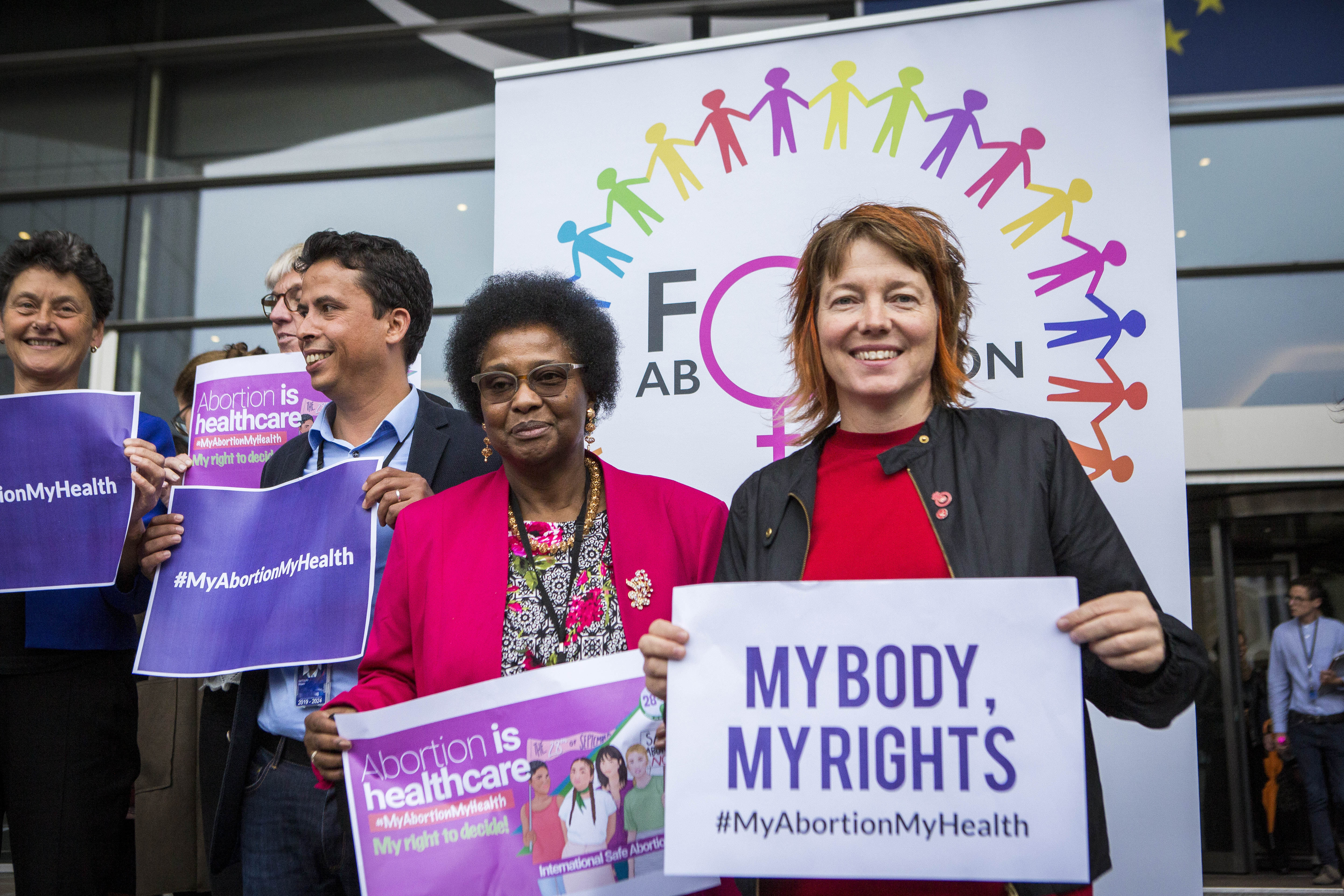 F70A8146